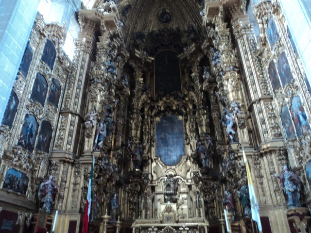 Uno de los altares principales dentro de la Catedral Metropolitana